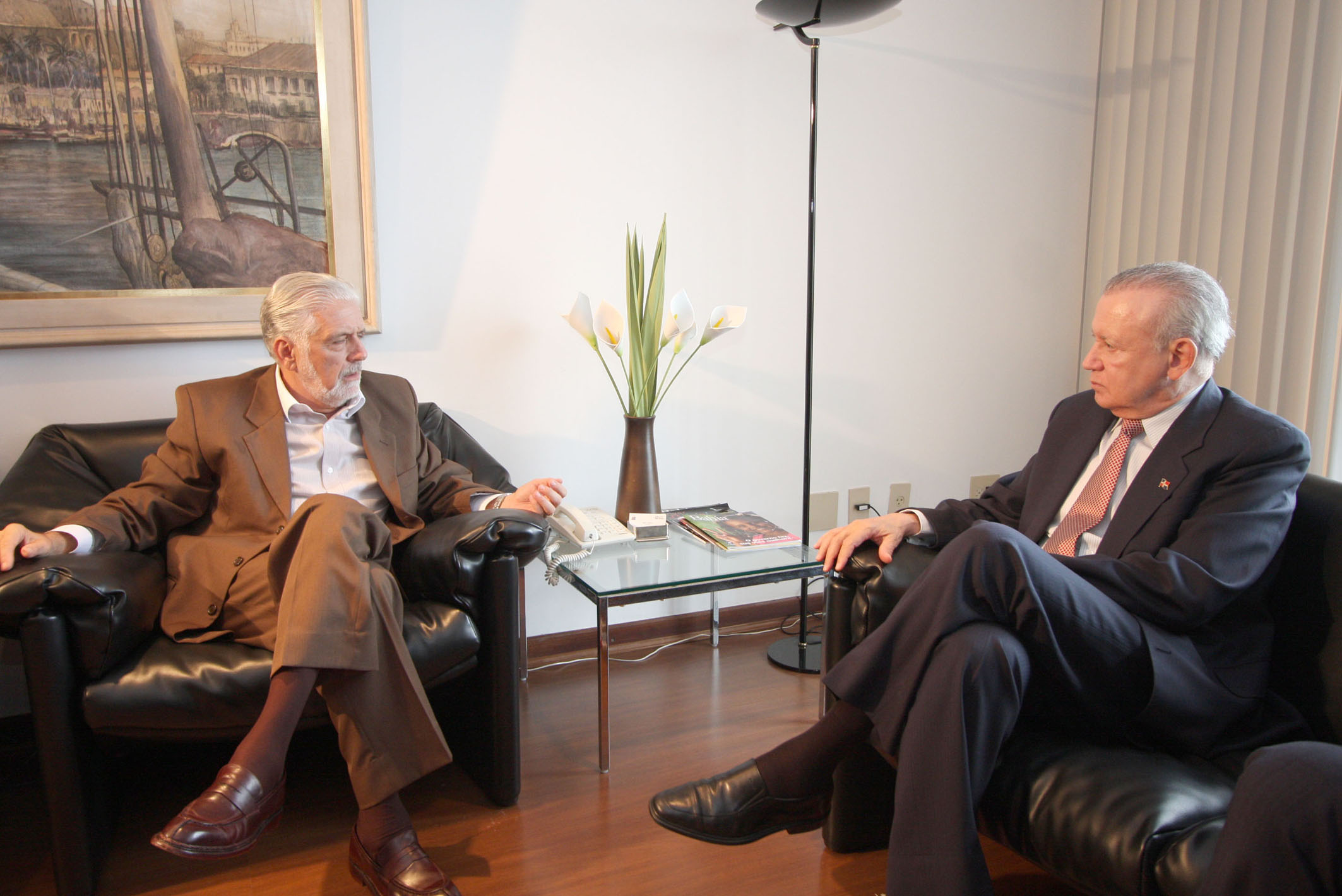 El gobernador de Bahia Jaques Wagner recibe al vicepresidente de la República Dominicana Rafael Alburquerque.